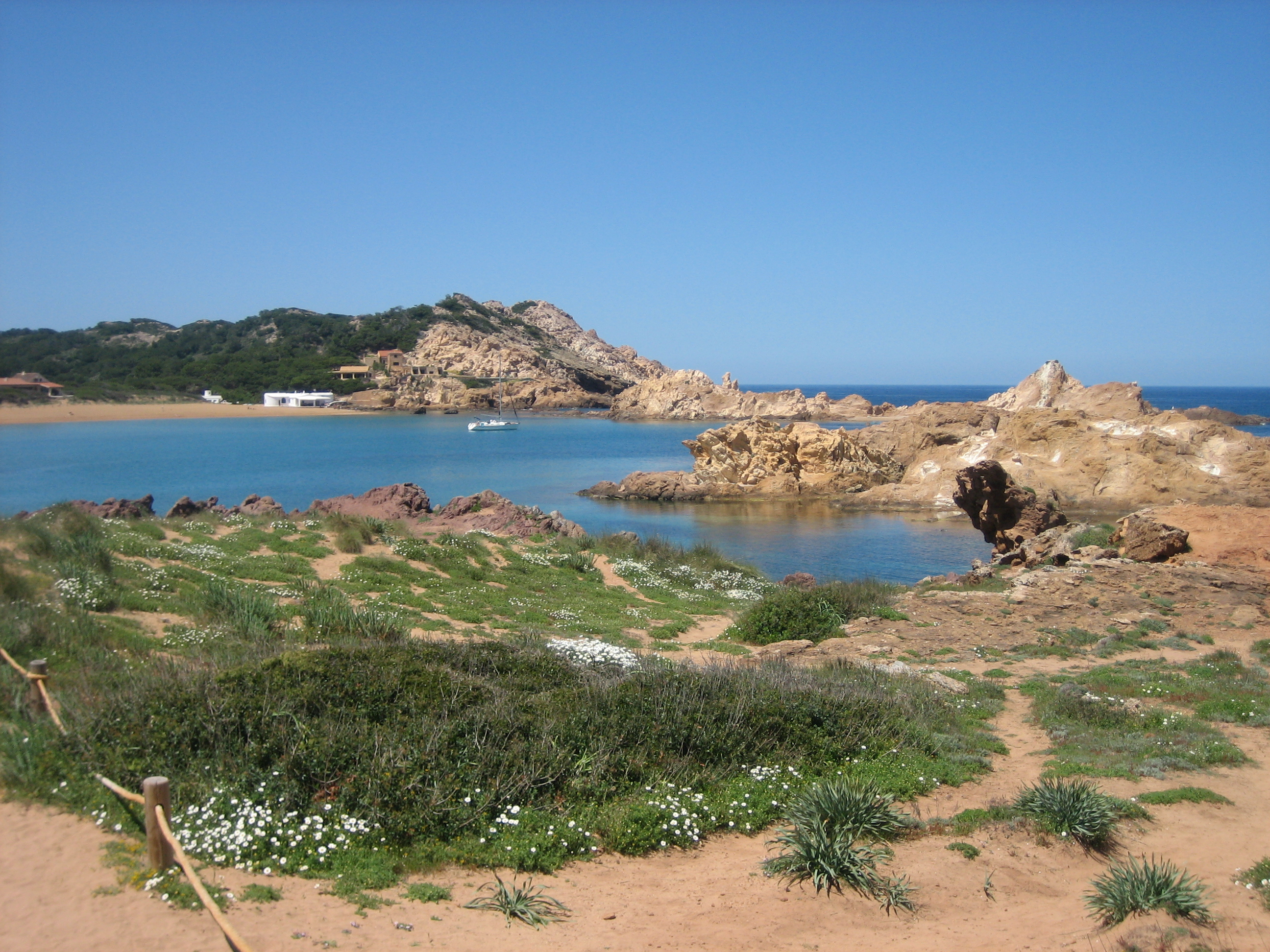 Cala Pregonda (es Mercadal) This is a a photo of a beach in the Balearic Islands, Spain, with id: PL-IB-74003